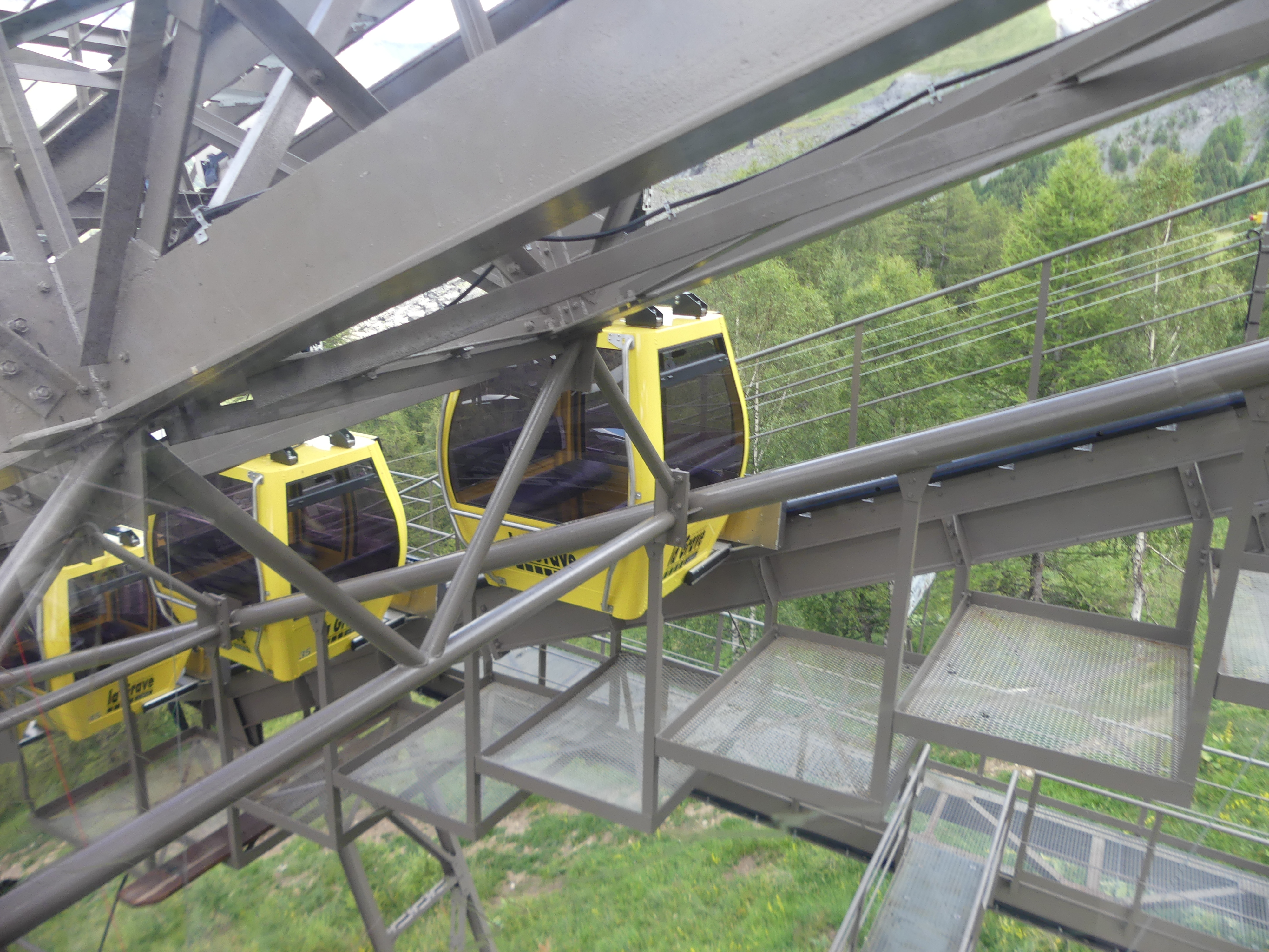 Gare intermédiaire du premier tronçon (fermée) du téléphérique de La Grave